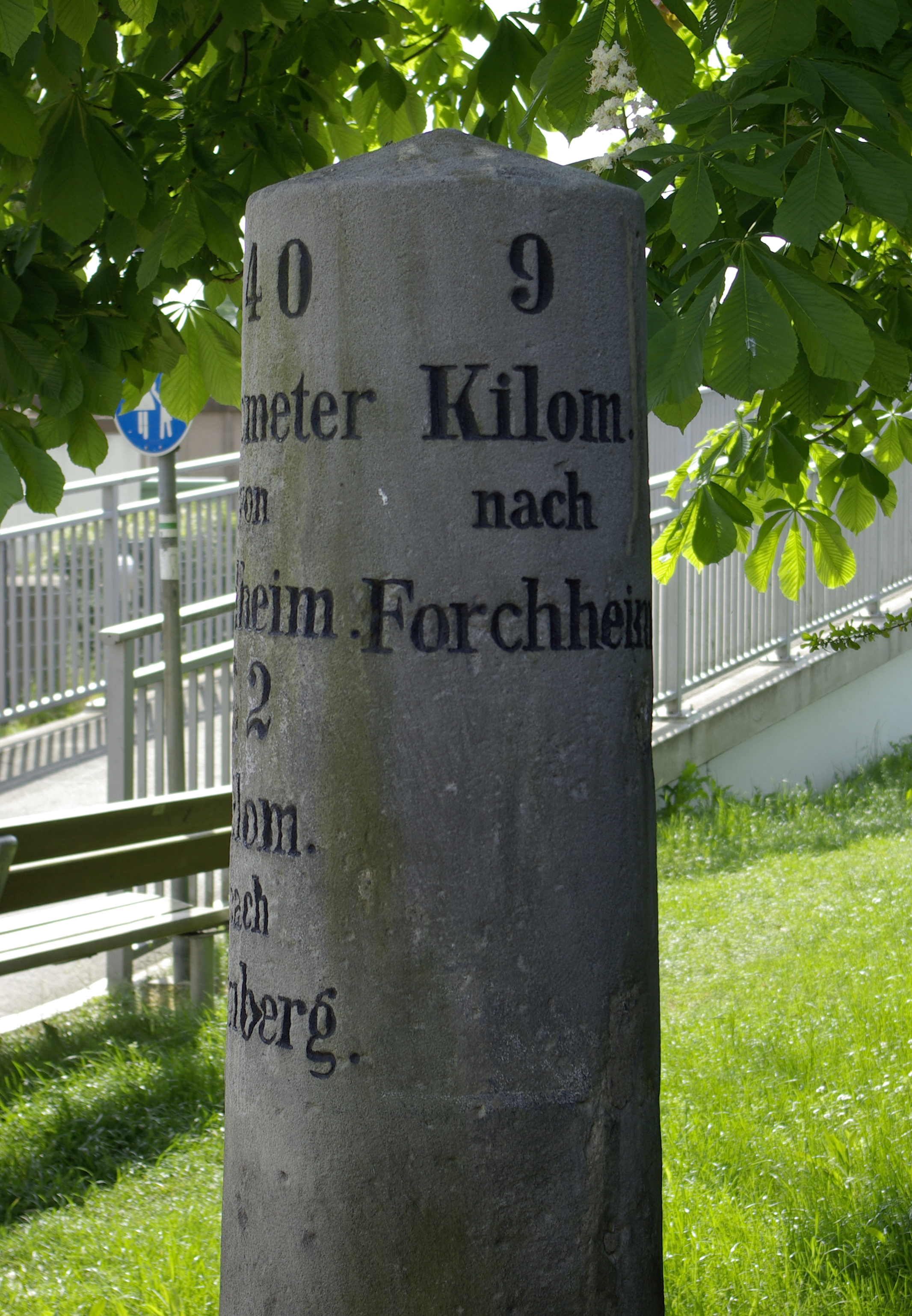 Kilometerstein 14 (140 Kilometer von Kelheim) des Ludwig-Donau-Main-Kanals in Baiersdorf.